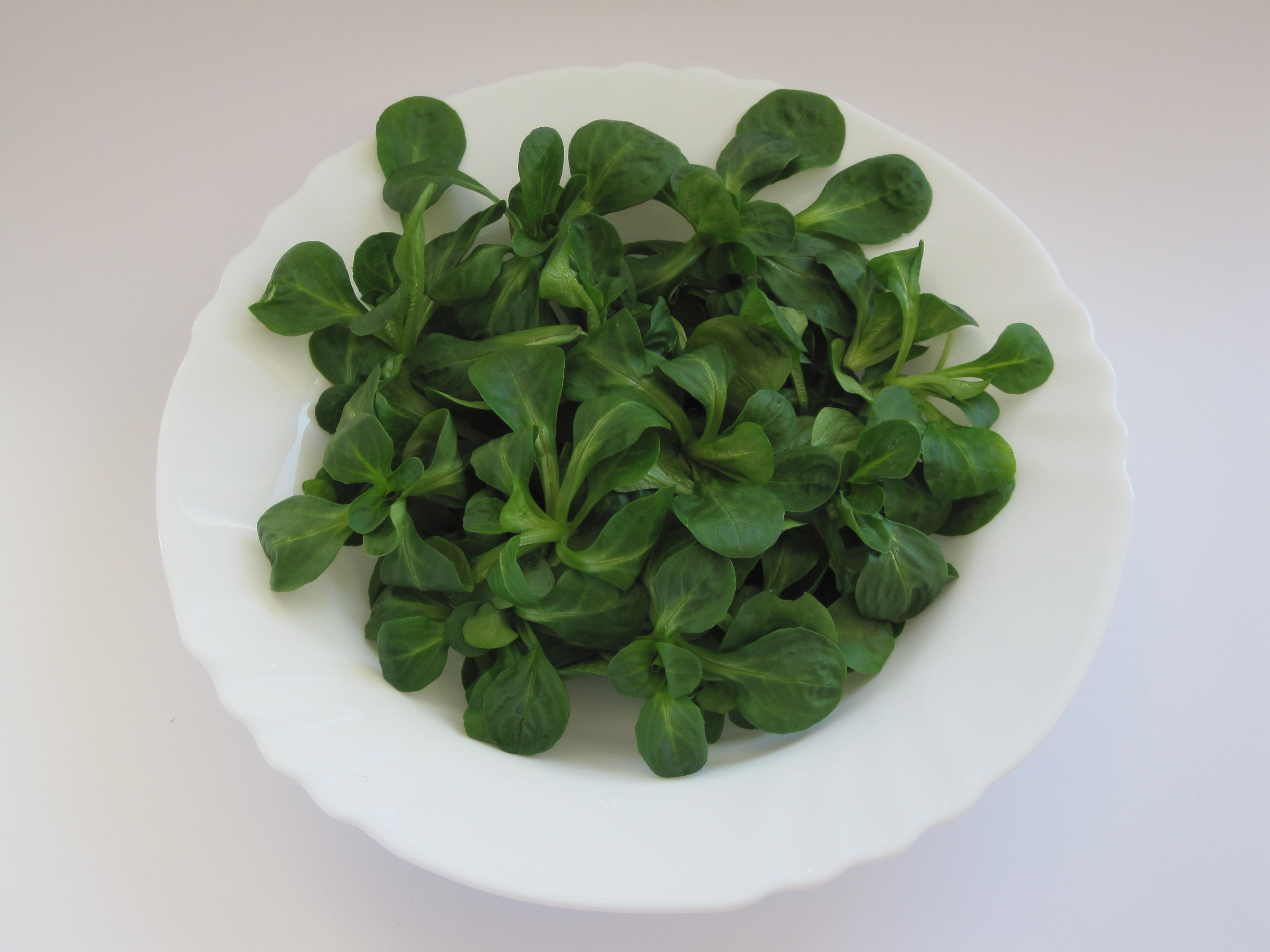 Ackersalat, auch Feldsalat